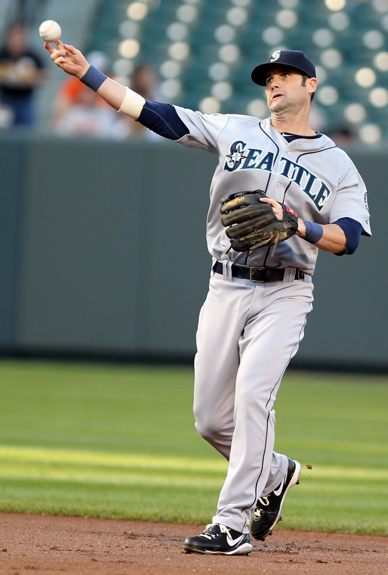 Adam Kennedy